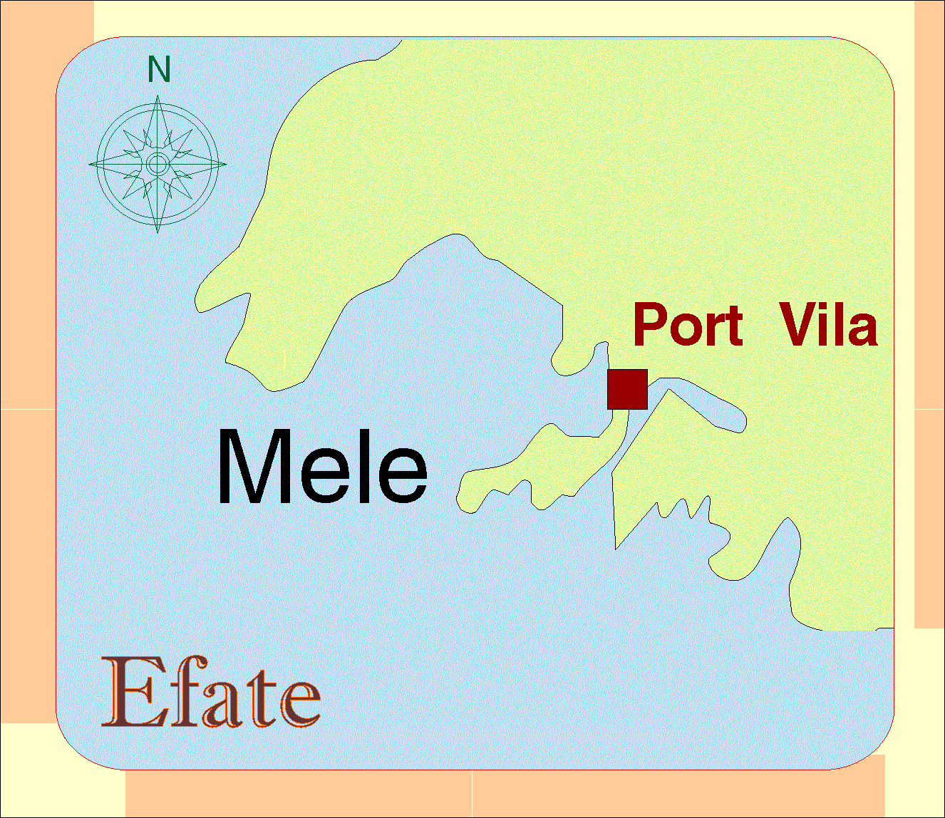 Карта на залима Мале.